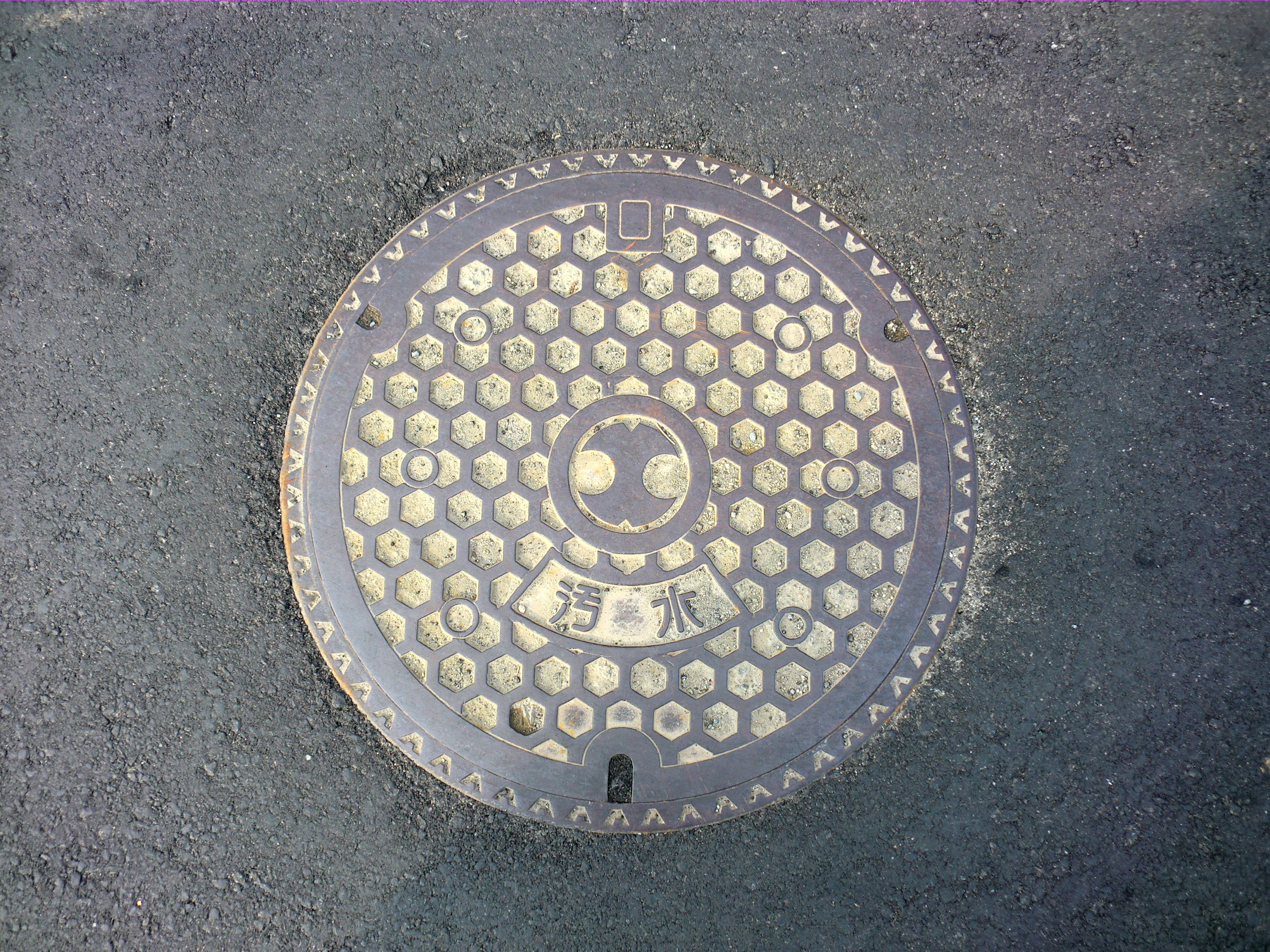 熊本市北区にある北部町時代の下水道の蓋